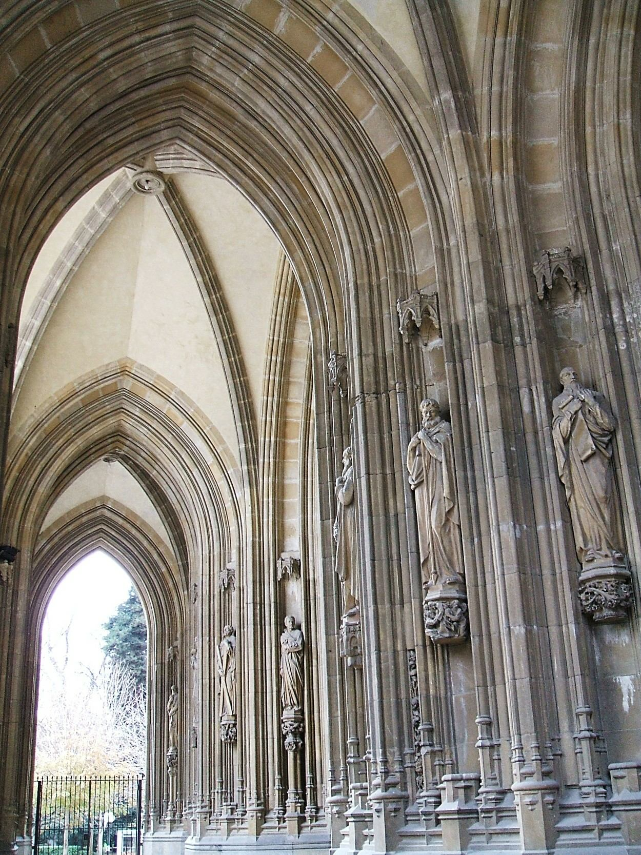 Interior del pórtico de la Catedral Nueva de Vitoria-Gasteiz